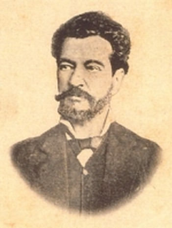 O escritor brasileiro Bernardo Guimarães - (1825 - 1884)